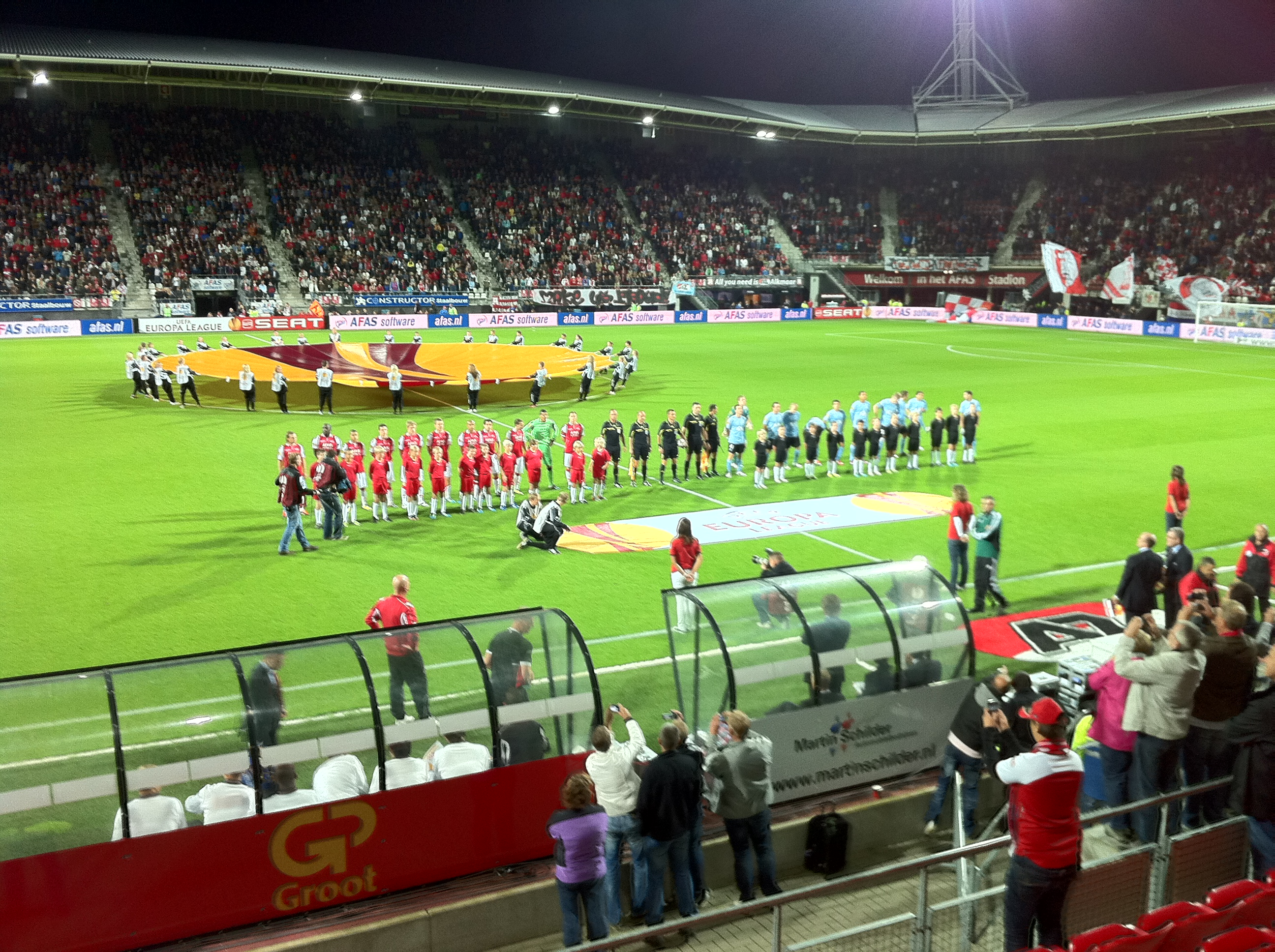 AZ-FC Malmo AFAS Stadion, Europa League 15 september 2011